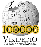 Varianto de logobildo de esperanta Vikipedio okaze de 100 000-a artikolo